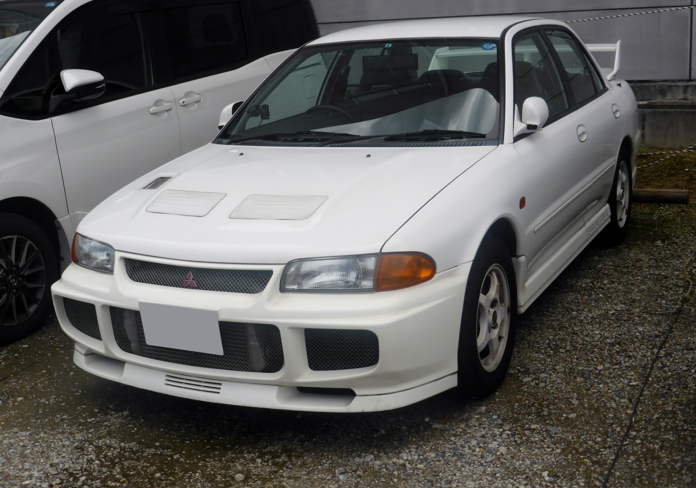 CE9A型三菱・ランサーGSRエボリューションIIIをフロントから撮影。